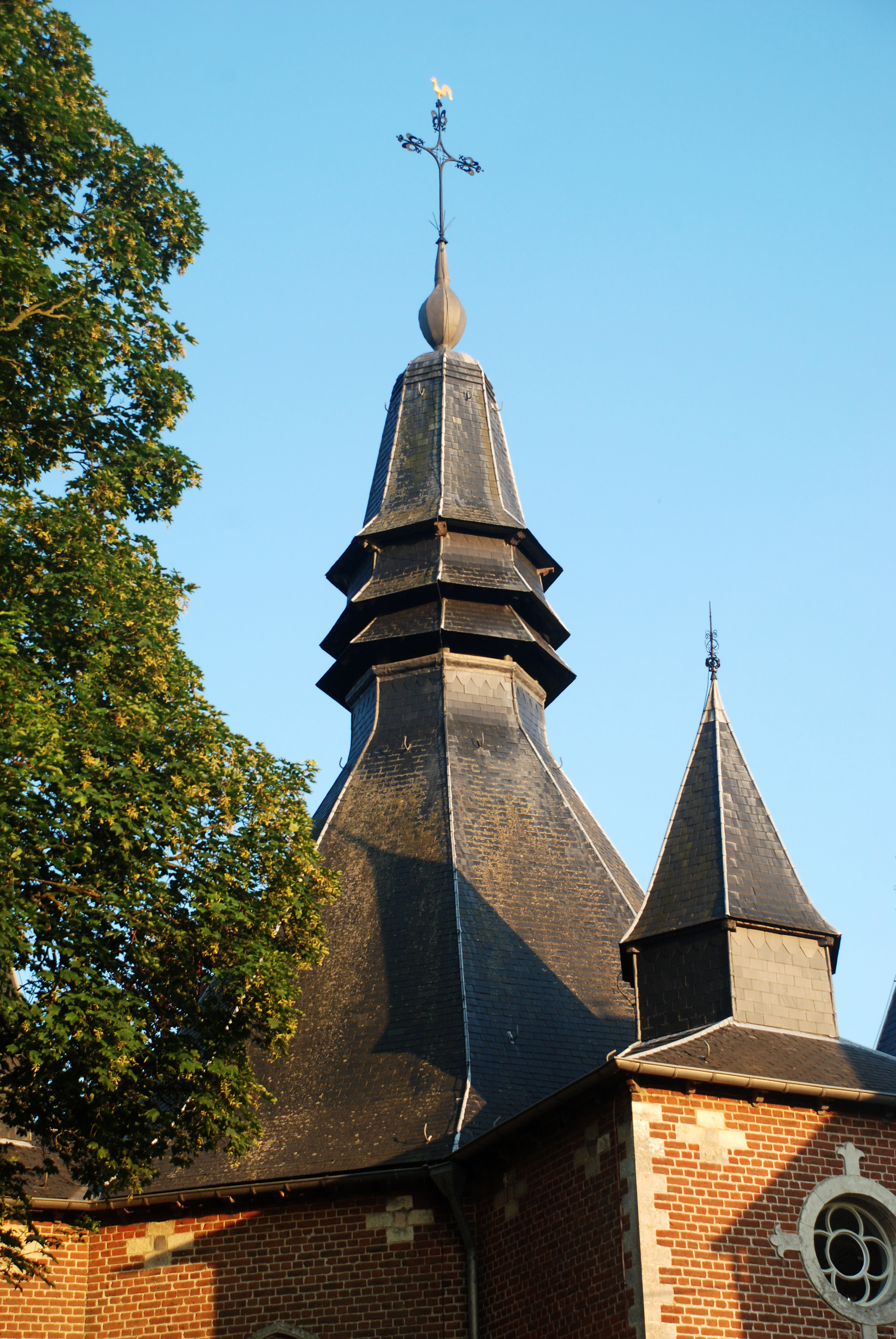 Belgique - Brabant wallon - Genappe - Loupoigne - Chapelle Notre-Dame de Foy